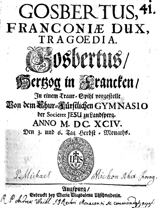 Programm einer Aufführung des Jesuitentheaters in Landsberg am Lech, 1694